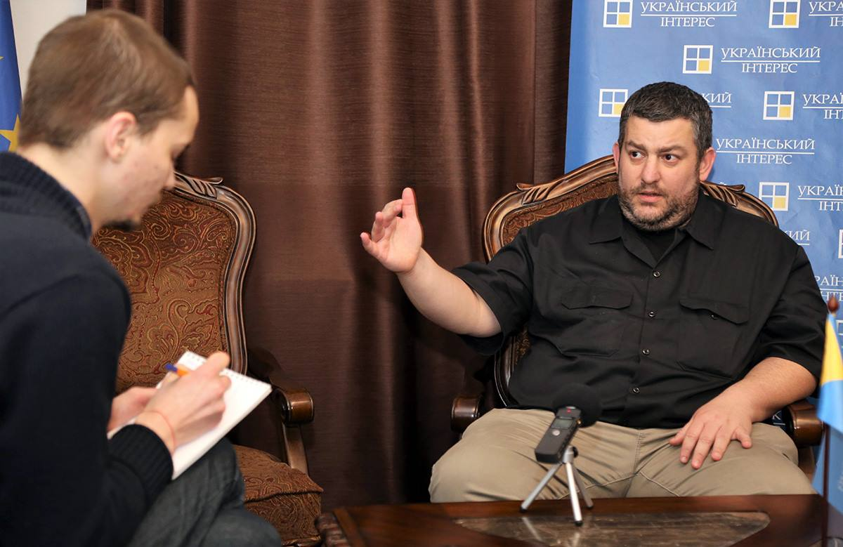 За сприяння Товариства редакторів української Вікіпедії інформаційний ресурс “Український інтерес” зустрівся зі старшим програмним директором Фонду Вікімедіа Асафом Бартовим.